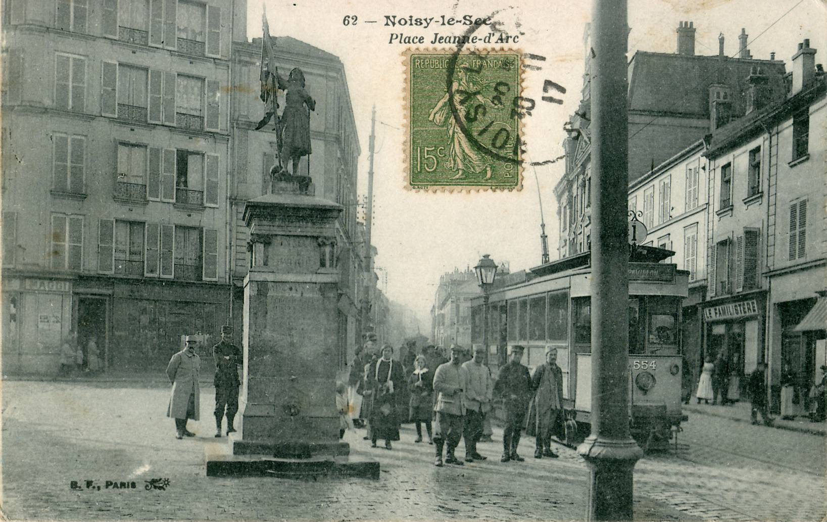 NOISY-LE-SEC : Place Jean Jaurès Au premier plan, la fontaine dédiée à Jeanne d'Arc, avec son bronze de 1910, ainsi que le tramway électrique N°554 circulant sur la ligne N°1 de la Compagnie des tramways de l'Est parisien